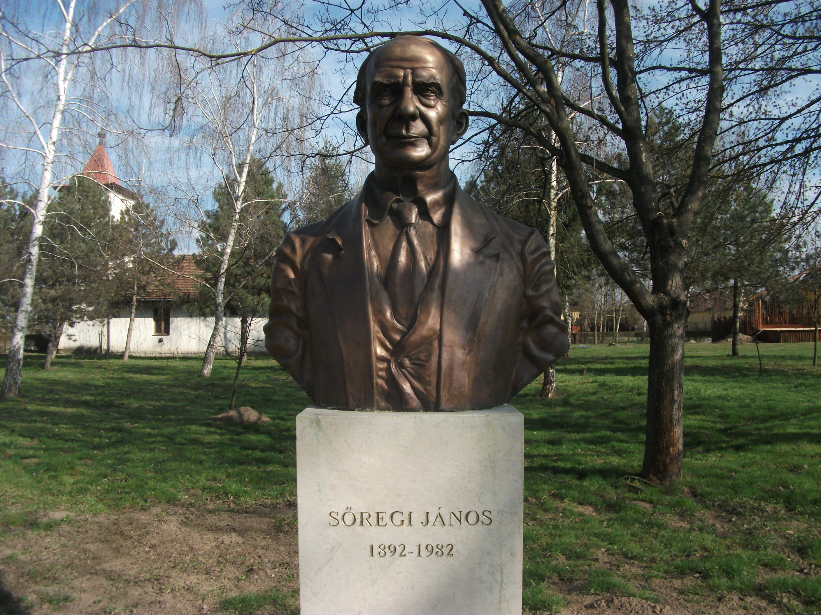 Sőregi János (1892 - 1982) régész, muzeológus, múzeumigazgató bronz mellszobra Cigándon, a Hősök terén. Czigándi Varga Sándor alkotása - 2013.